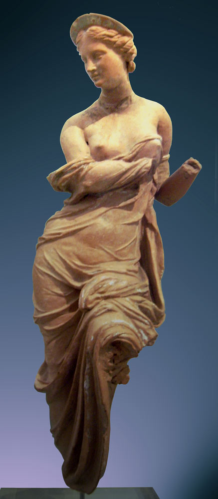 Tonfigur der Aphrodite; 2. Jh. v. Chr., aus Kleinasien, 1930 für die Antikensammlung Berlin aus der Sammlung Heil erworben, Höhe 37,6 cm, wenige Farbspuren, Inventarnummer 31272